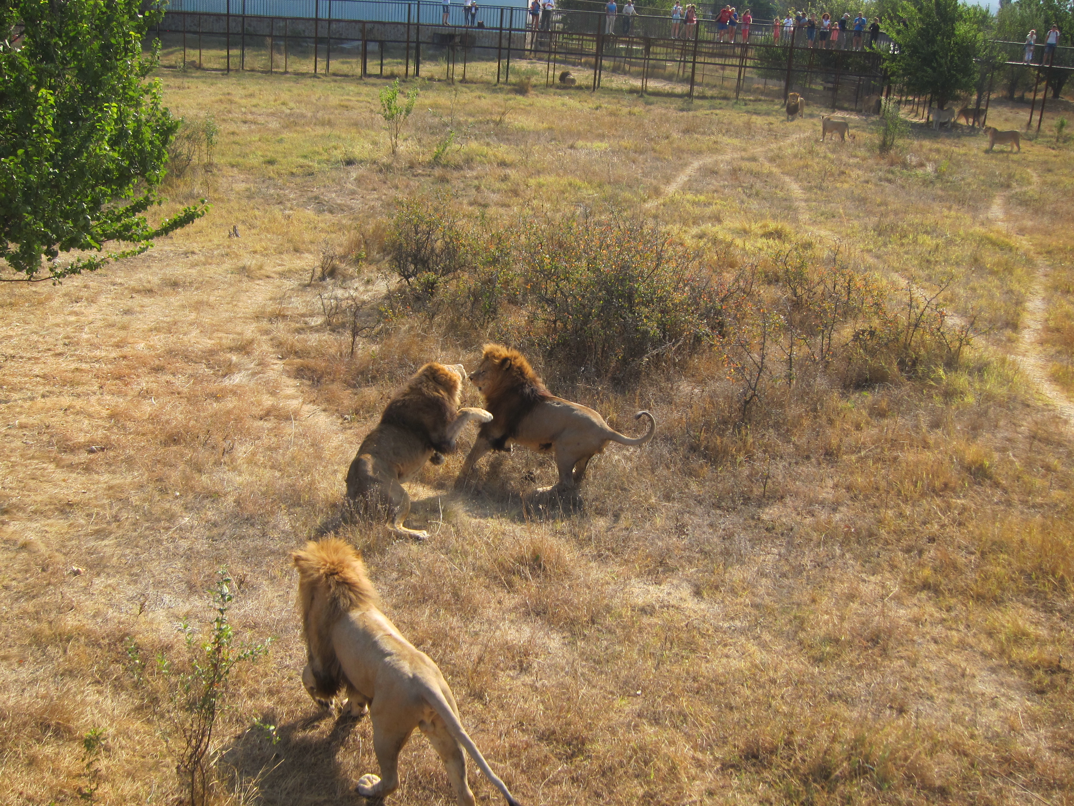 Сафари-парк «Тайган»: ул. Лавандова, 1, г. Белогорск, Белогорский район, Крым This object is located on the Crimean Peninsula and recognized as a protected area by both Russia and Ukraine under the ID: 8210074 / 01-207-5012, respectively. The legal status of the Crimean region is currently disputed.